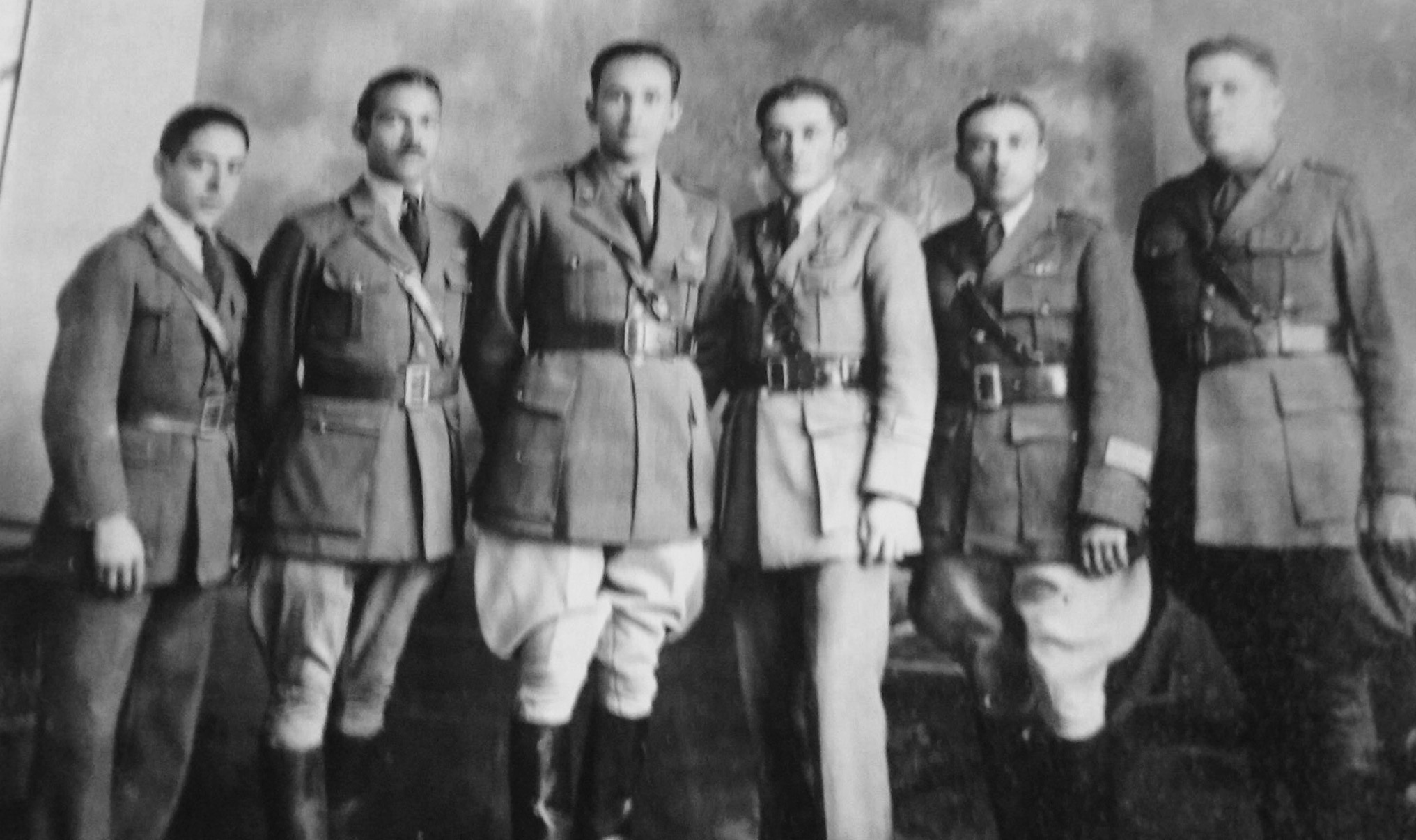 Pioneros de la aviación en Guatema: oto de grupo de militares: Coronel de Infantería Manuel Samayoa, Coronel Ricardo Rodas, Coronel Miguel García Granados, Coronel Jacinto Rodríguez Diaz, Coronel Oscal Morales López y Coronel Perfecto Flores.